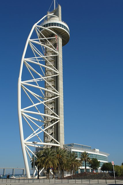 Photographer: Osvaldo Gago